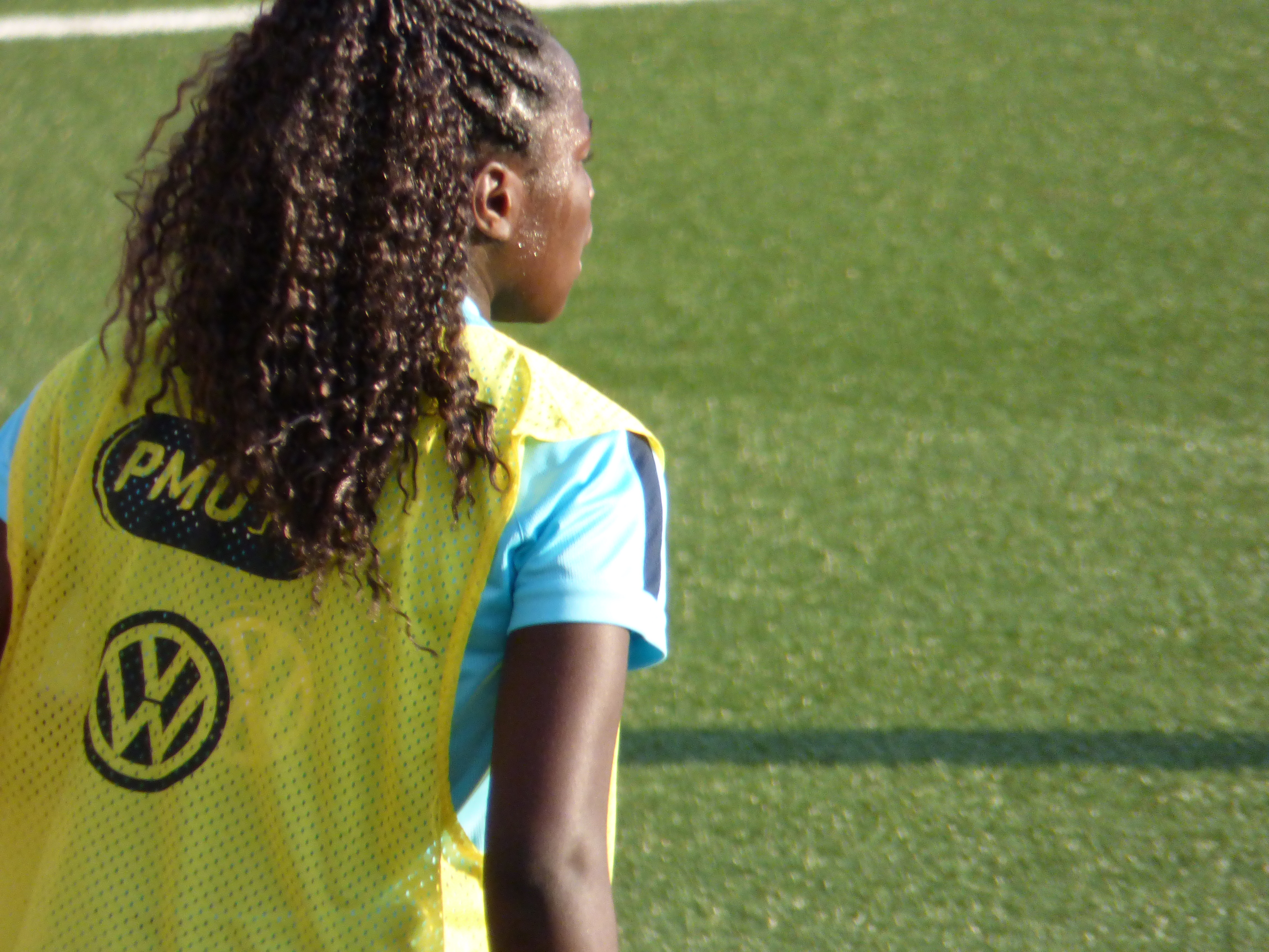 Equipe de france de FOOTBALL FEMININ à l'entrainement en préparation du MATCH FRANCE ECOSSE du 28 MAI 2015